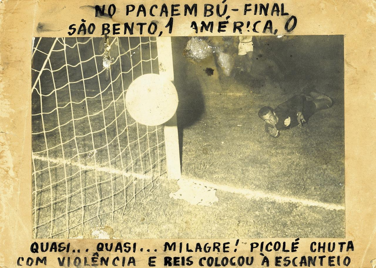 Foto Original da final entre São Bento e América, no Estádio do Pacaembú ocorrida em 23 de fevereiro de 1963.